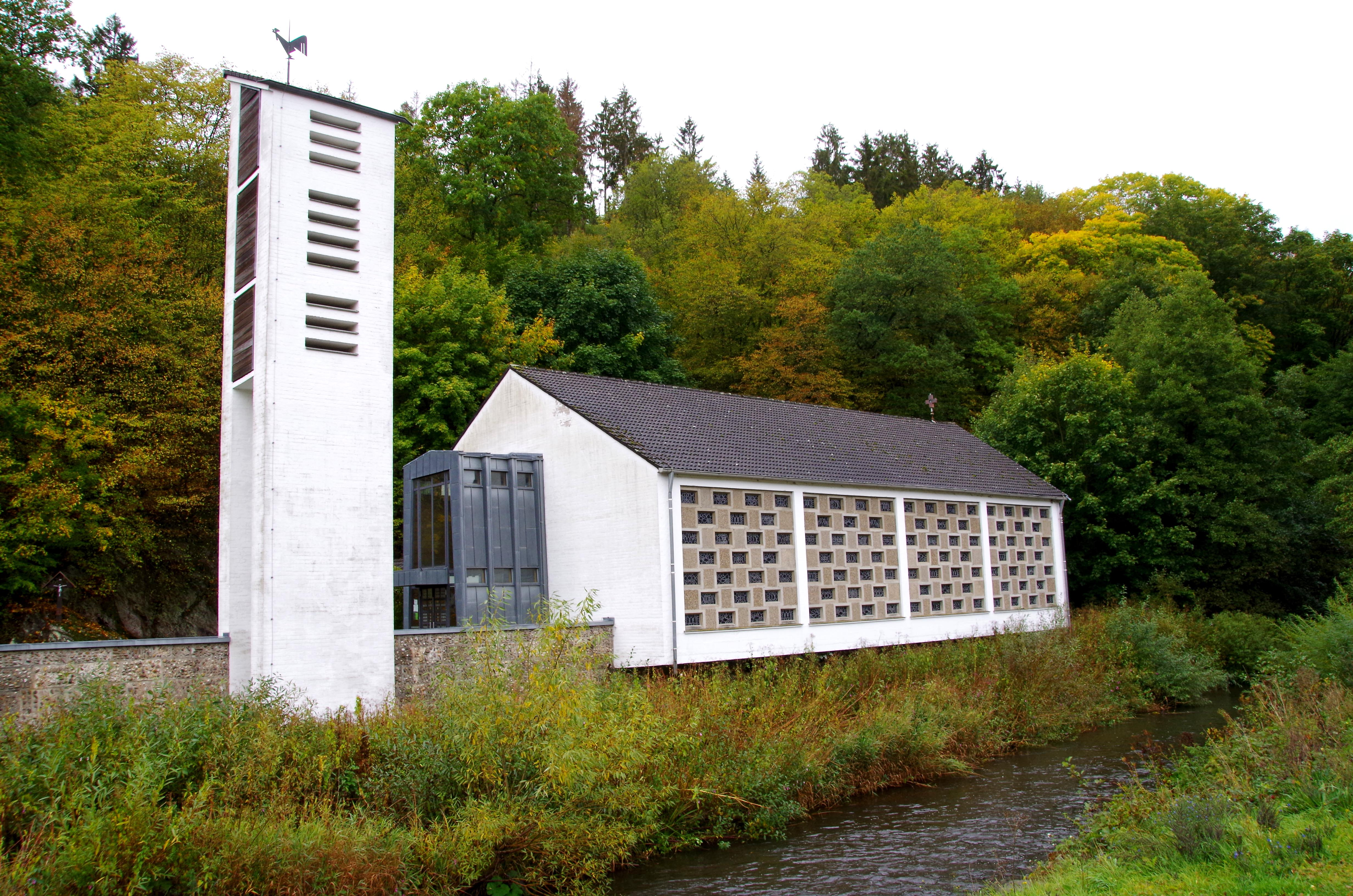 St. Josef (Oberhausen), Außenansicht an der Olef